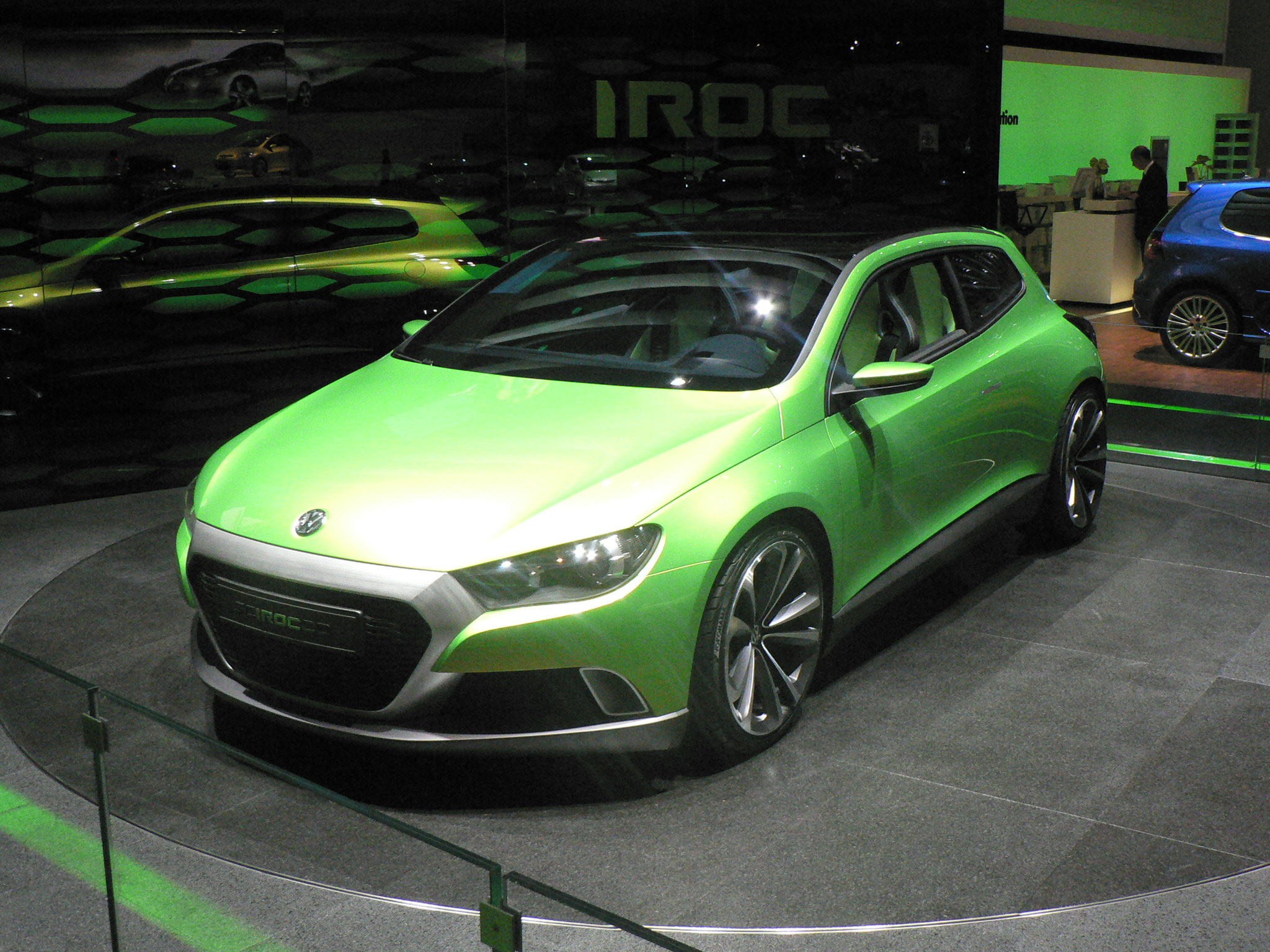 Mondial de l'automobile, Paris 2006